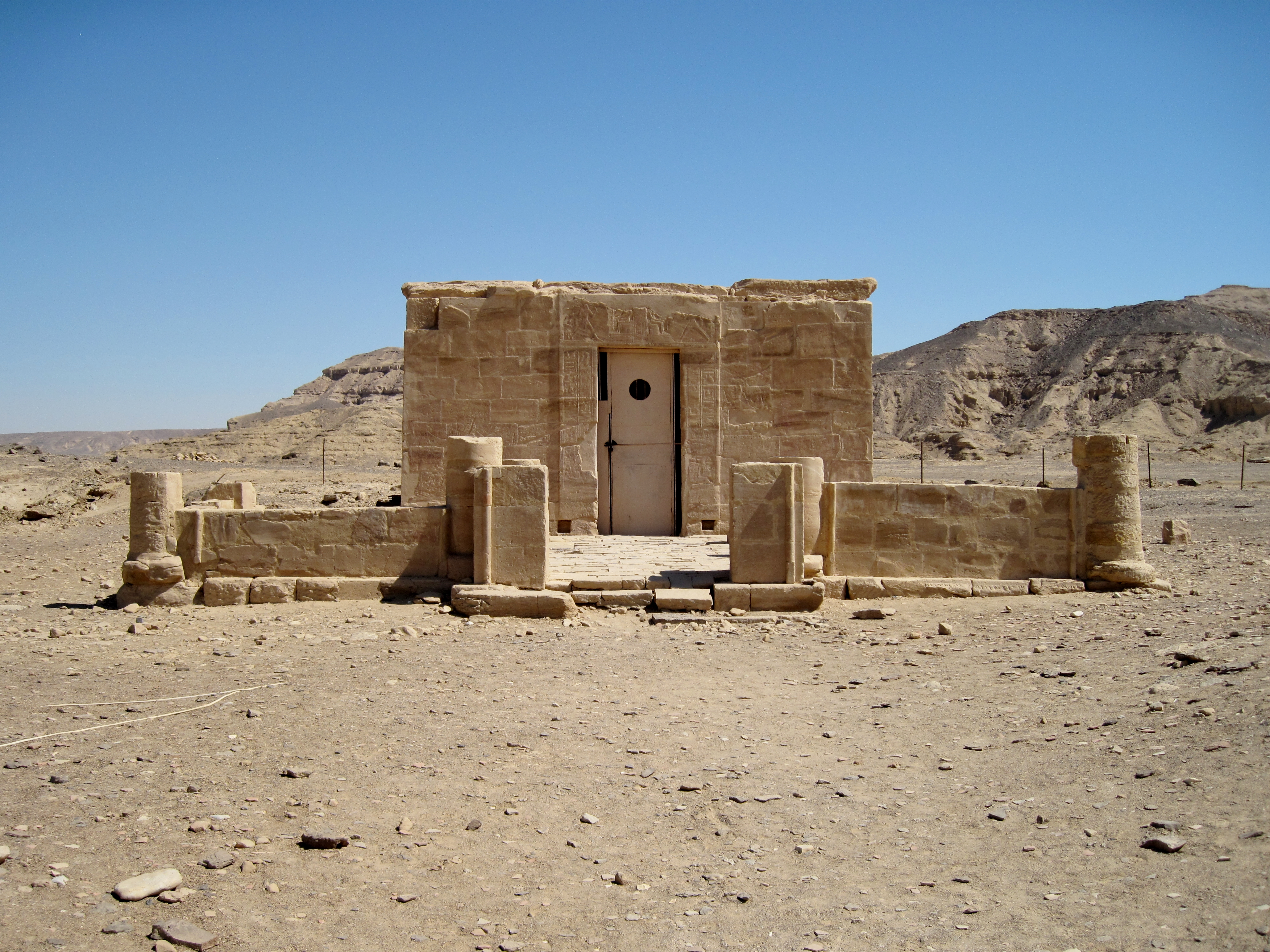 Tempel Amenophis’ III., gewidmet Nechbet und Hathor, nahe dem altägyptischen Necheb (heute el-Kab), Ägypten